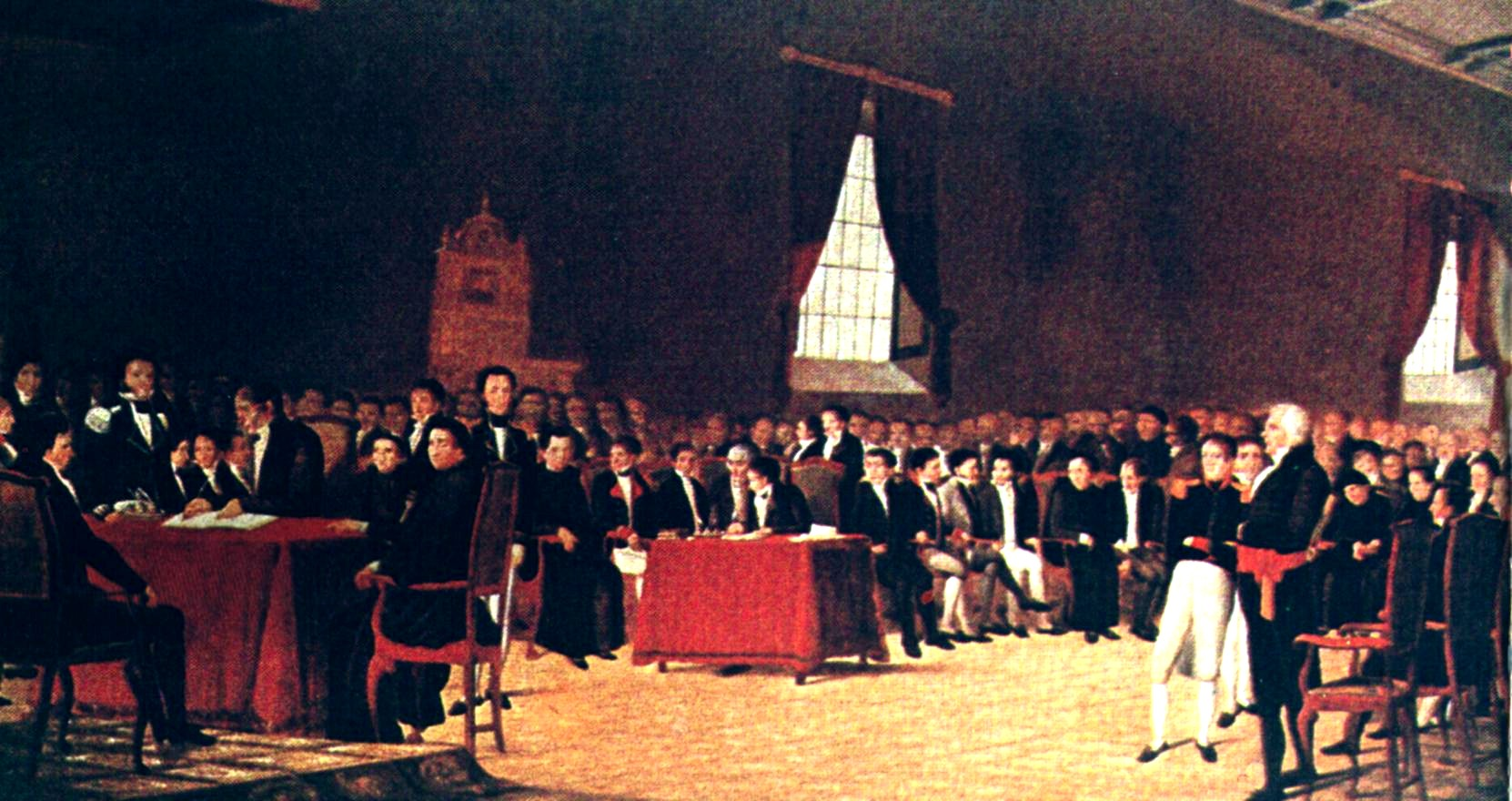 Juan Lovera: Firma del Acta de Independencia.